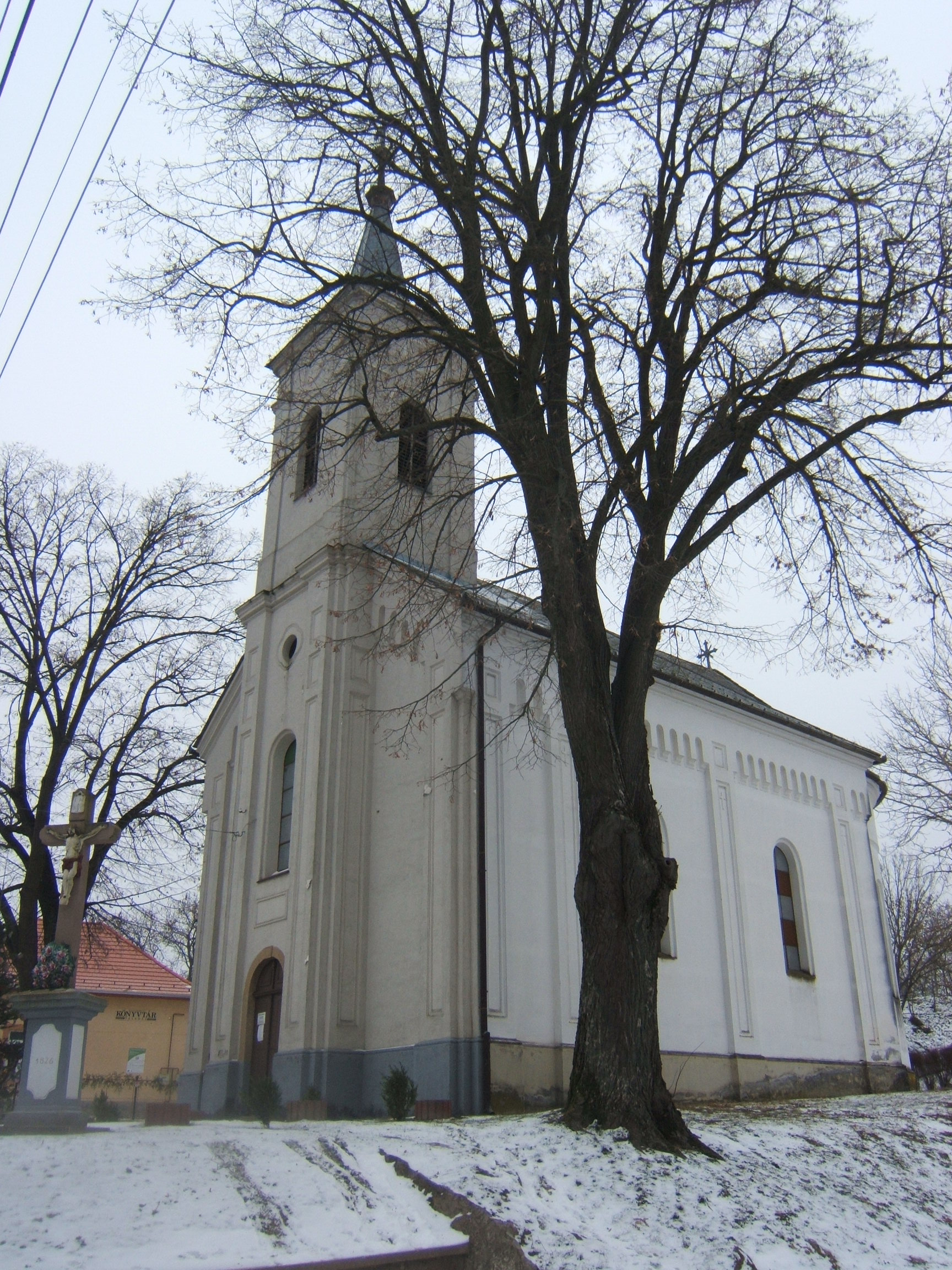 Kaposhomok, templom